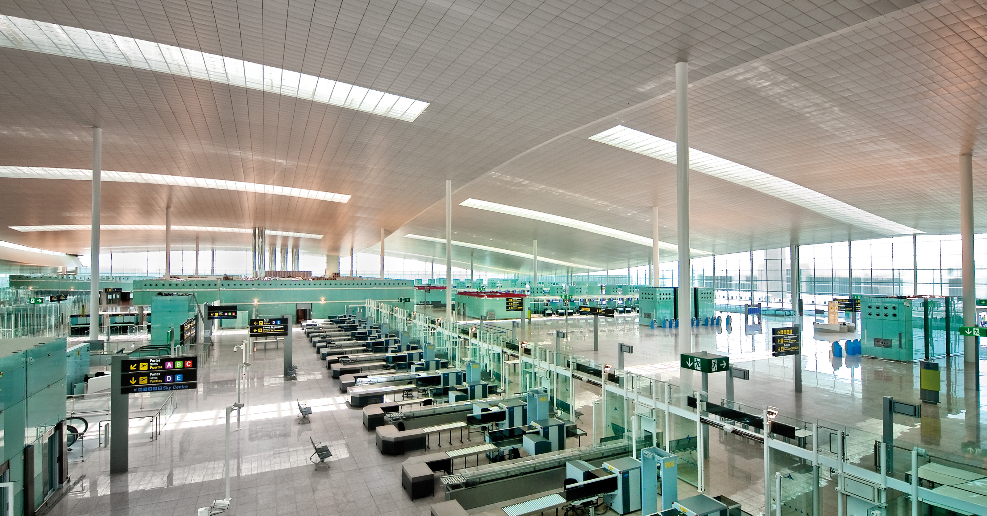 Vestíbulo de salidas y filtros de seguridad de la terminal T1 del aeropuerto de Barcelona